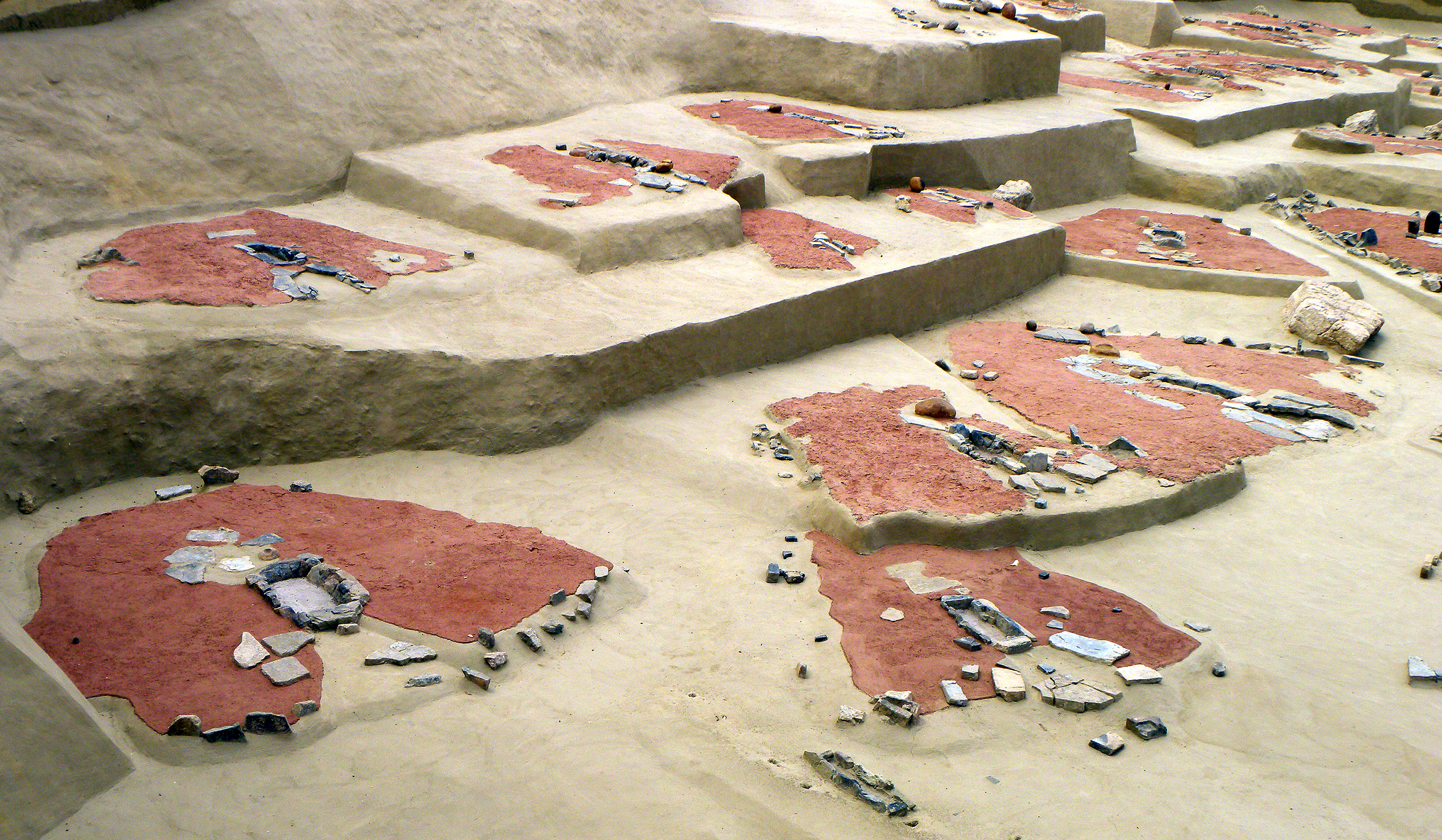 Lepenski vir